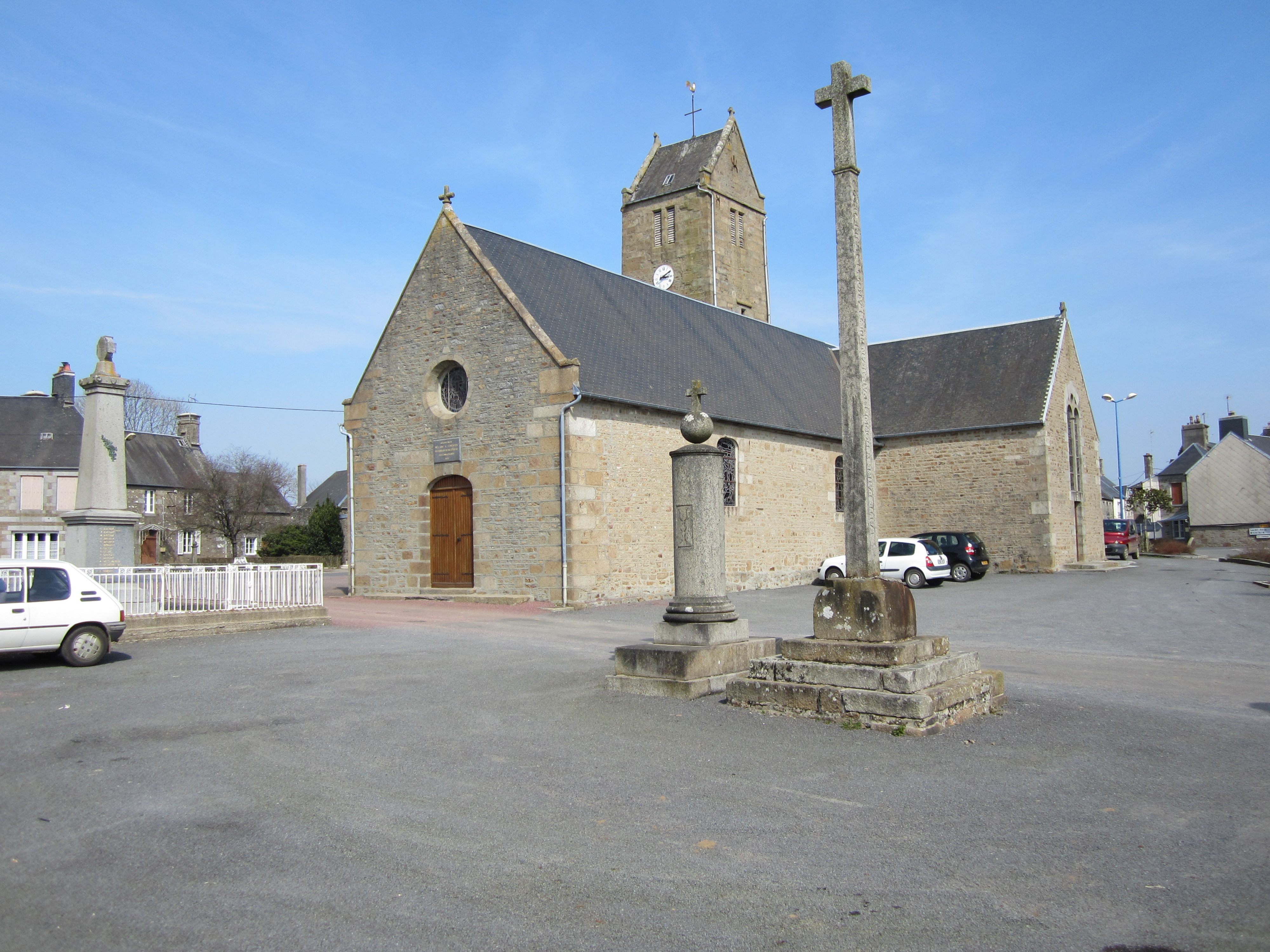 Église Notre-Dame de Coulouvray-Boisbenâtre